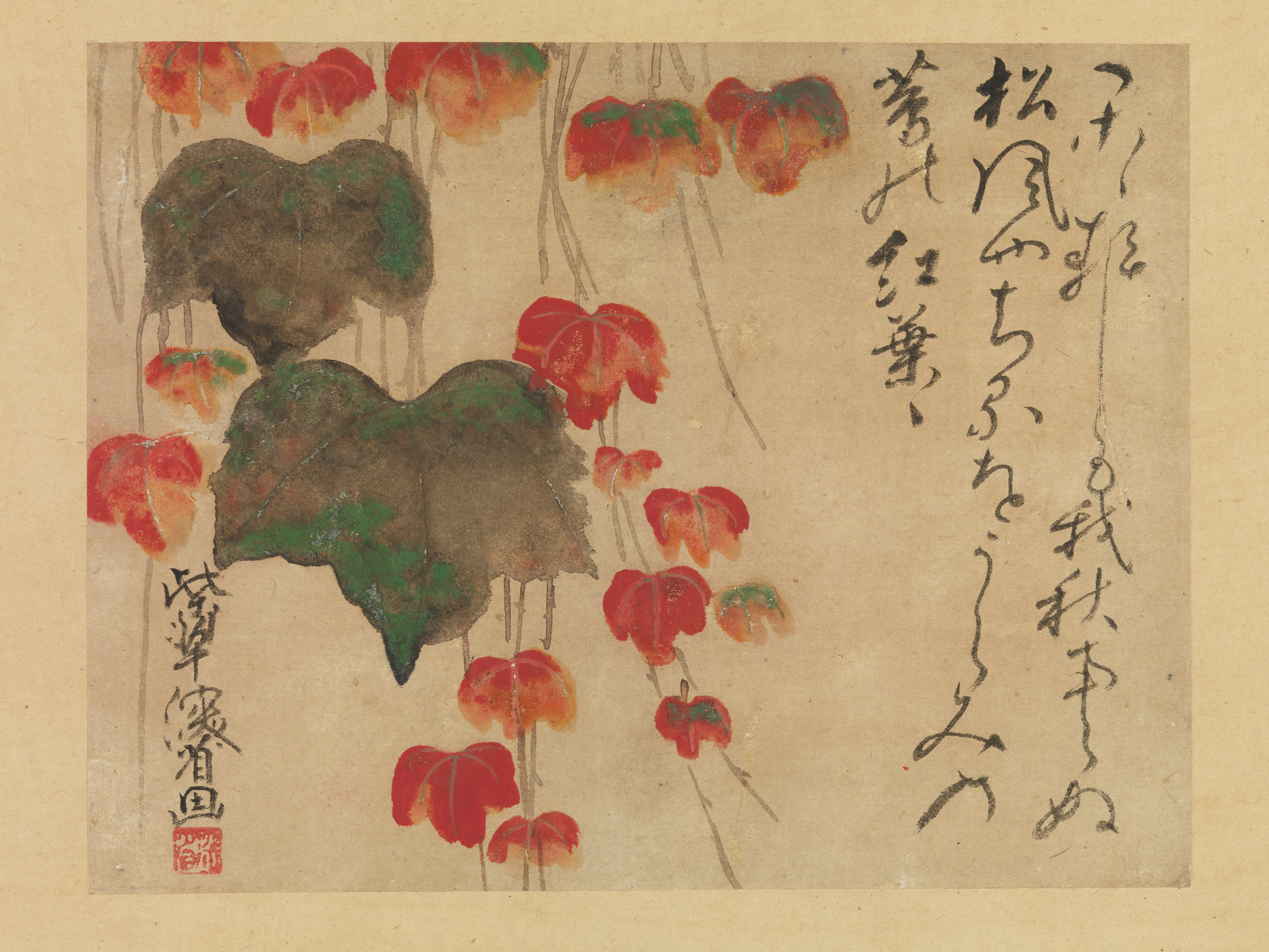 Japan; Hanging scroll; Paintings